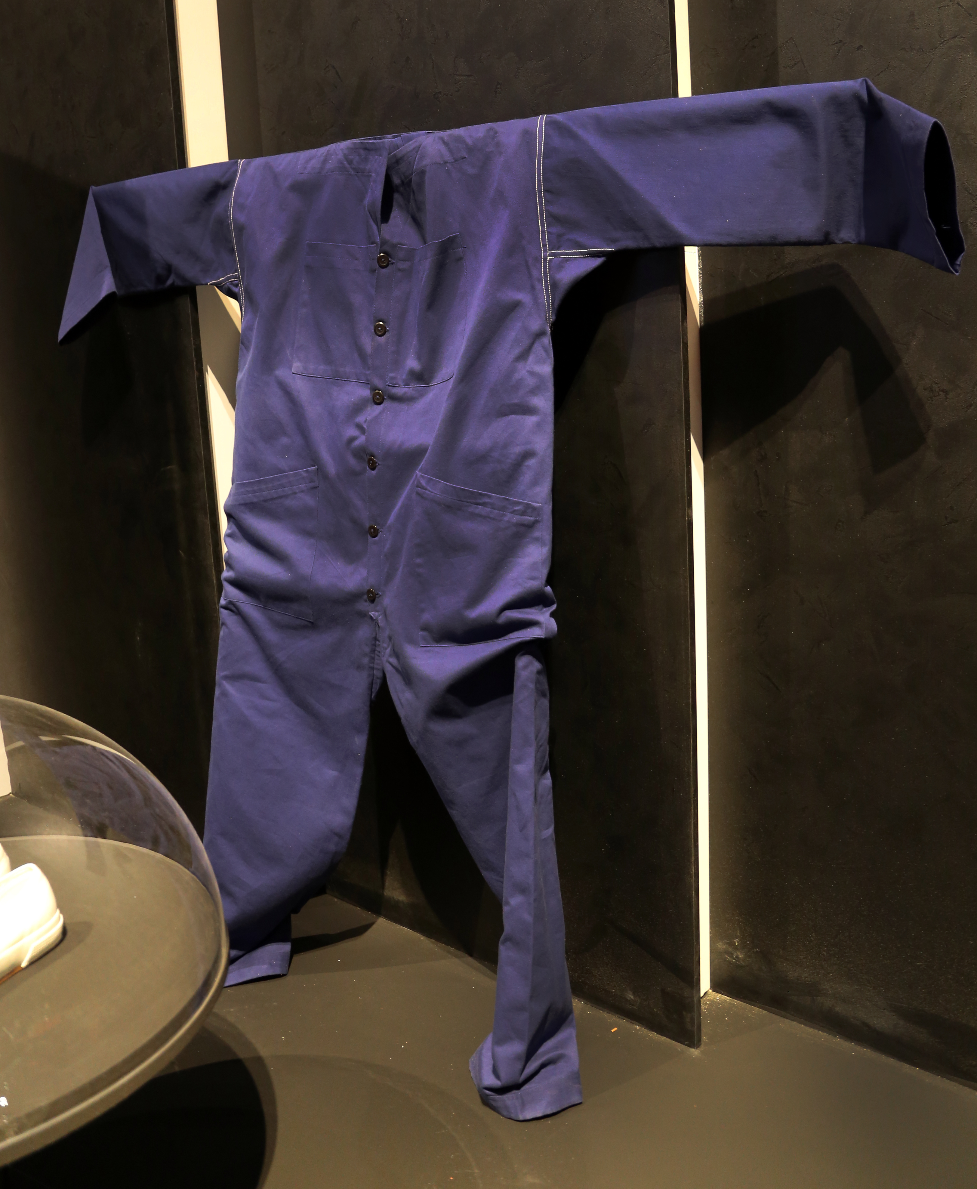 palazzo dell'Arte This is a photo of a monument which is part of cultural heritage of Italy.